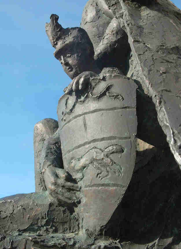 Statue vor Rathaus Mittelbiberach. Selbst Fotografiert am 07.01.2005. Lizenz gnu-fdl --Marci 14:30, 7. Jan 2005 (CET)